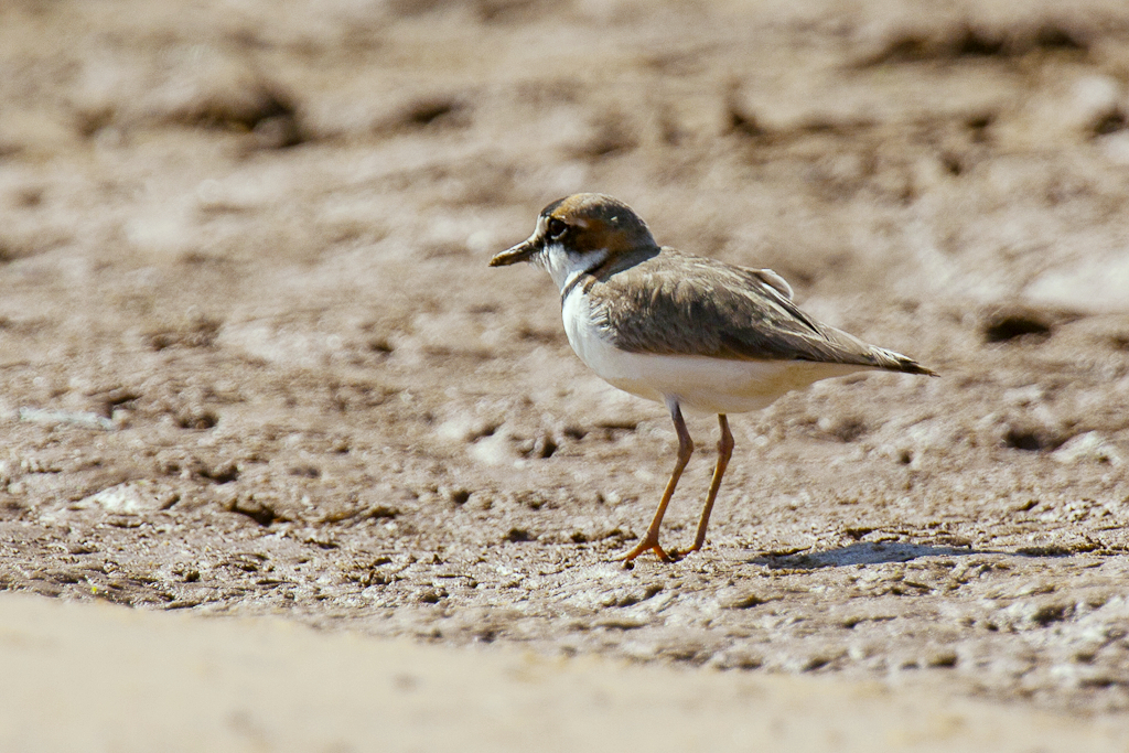 Collared Plover - Panatanal - Brazil_H8O1768